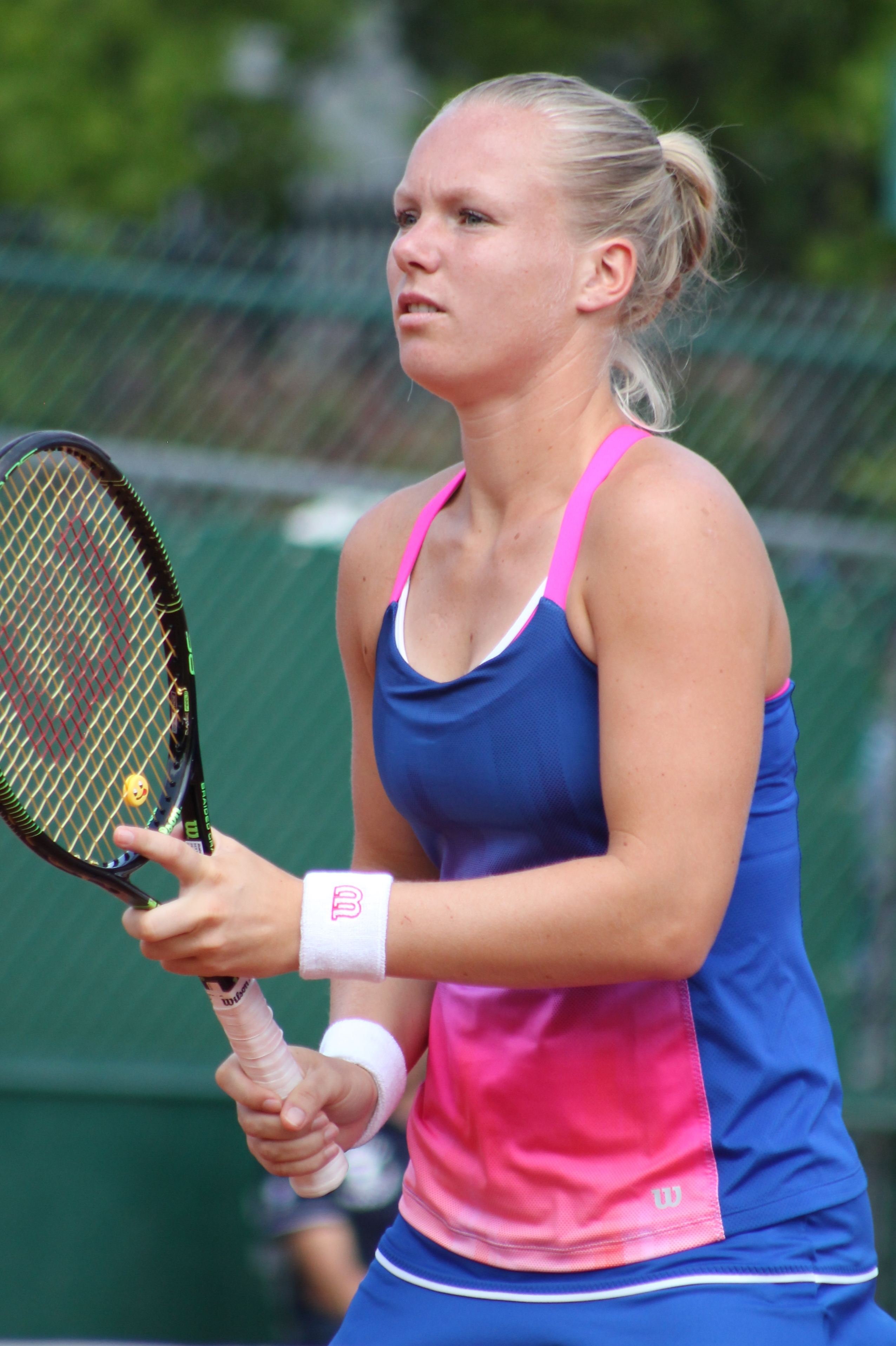 Bertens RG16 (5)